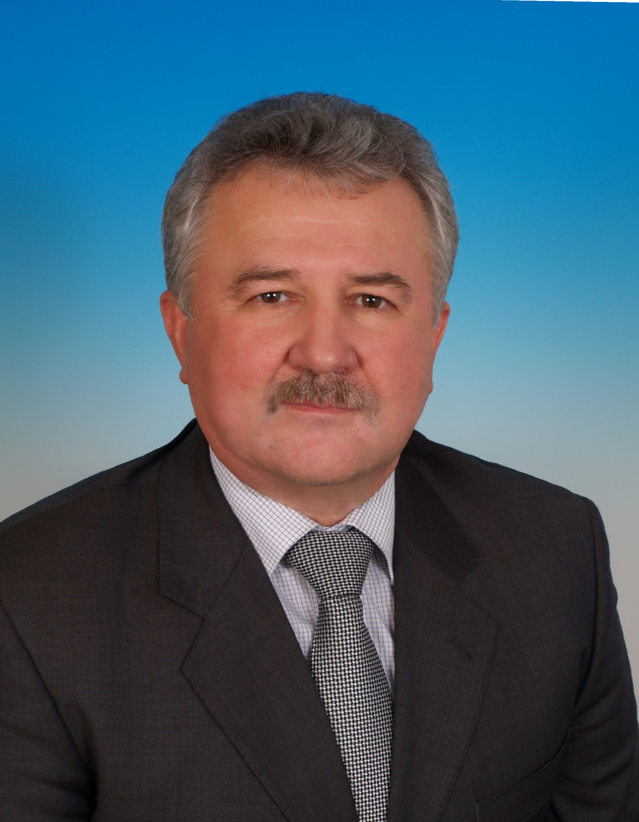 Е.С. Москвичев